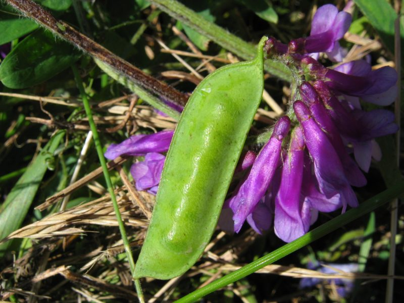 Vicia villosa, Kristian Peters 3.7.2004, Warnow-Wiesen Die Bezeichnung "Schote" ist botanisch nicht korrekt; richtig ist Hülse.